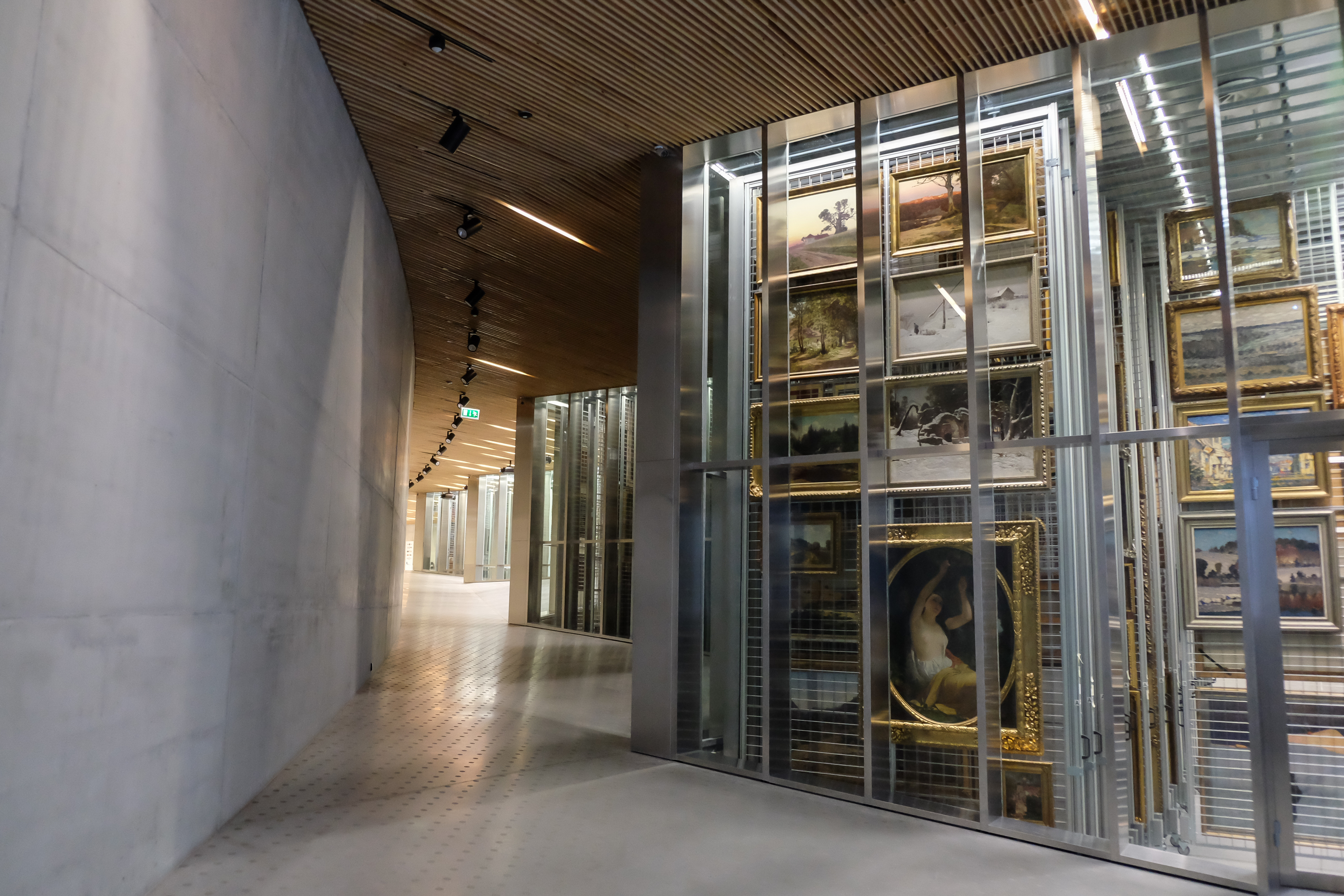 Muzejs, Rīga, Krišjāņa Valdemāra iela 10a